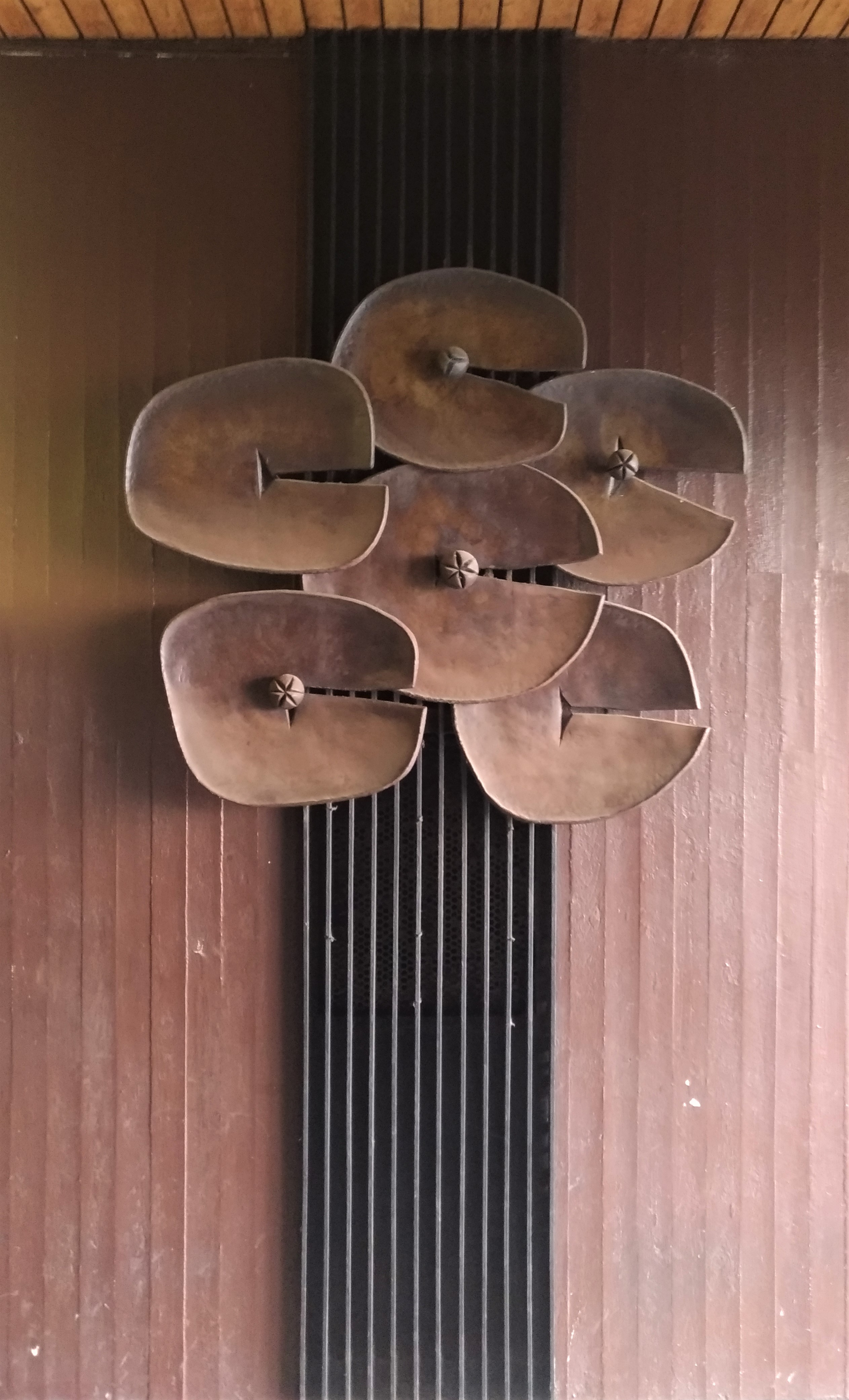 Keramická plastika Arnošta Paderlíka u vstupu do pasáže obchodního domu Kotva v Praze.